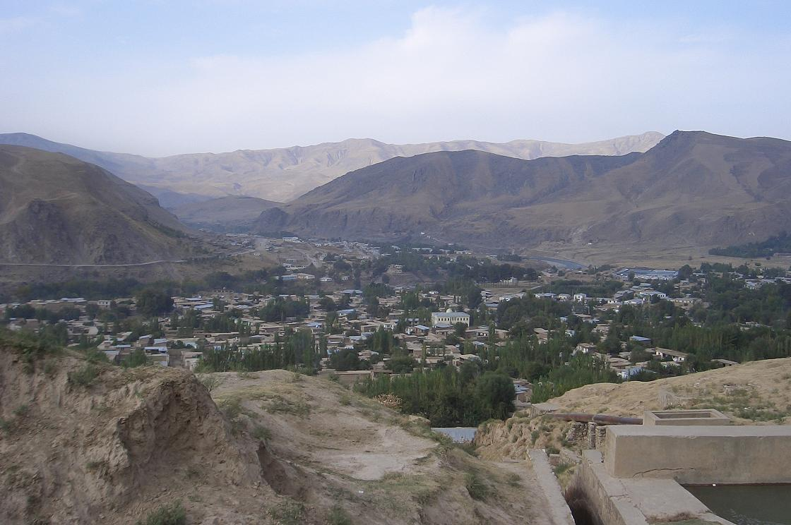 Faizabad